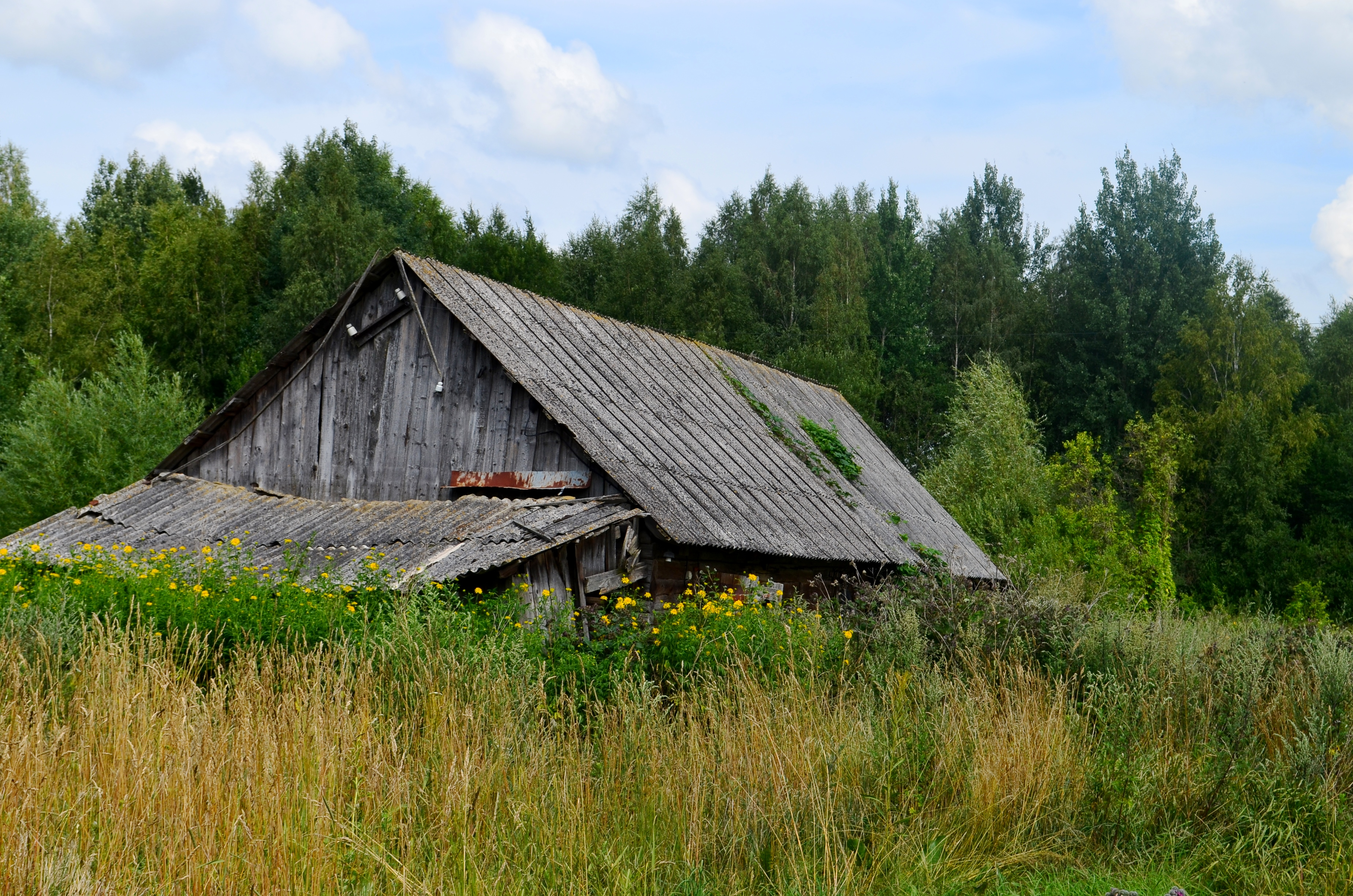 Piktagalio k., Truskavos sen., Kėdainių raj.